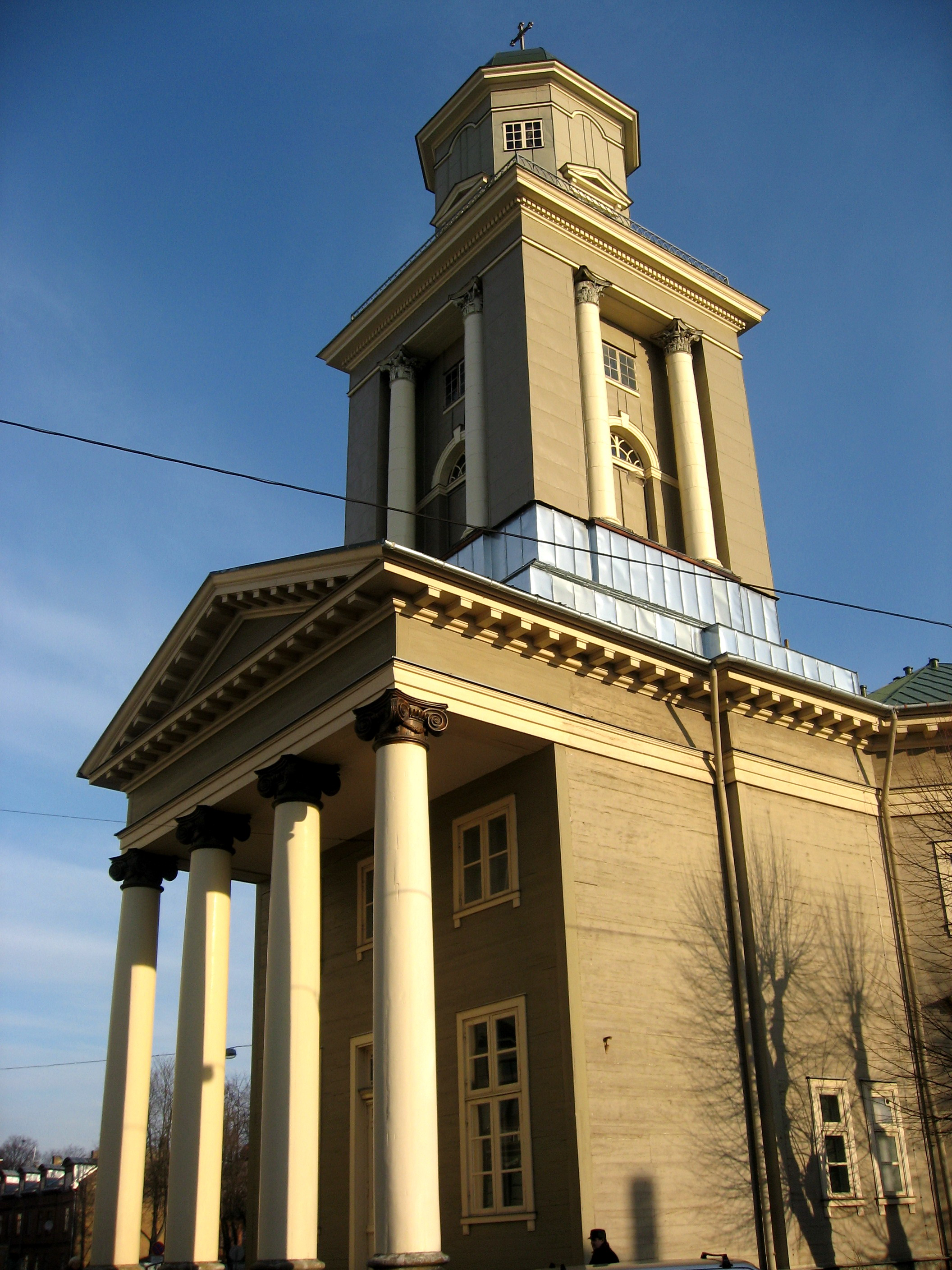 Rīgas Jēzus luterāņu baznīca